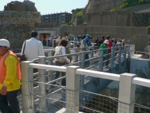 端島に上陸する観光客。ドルフィン桟橋にて。(低解像度)